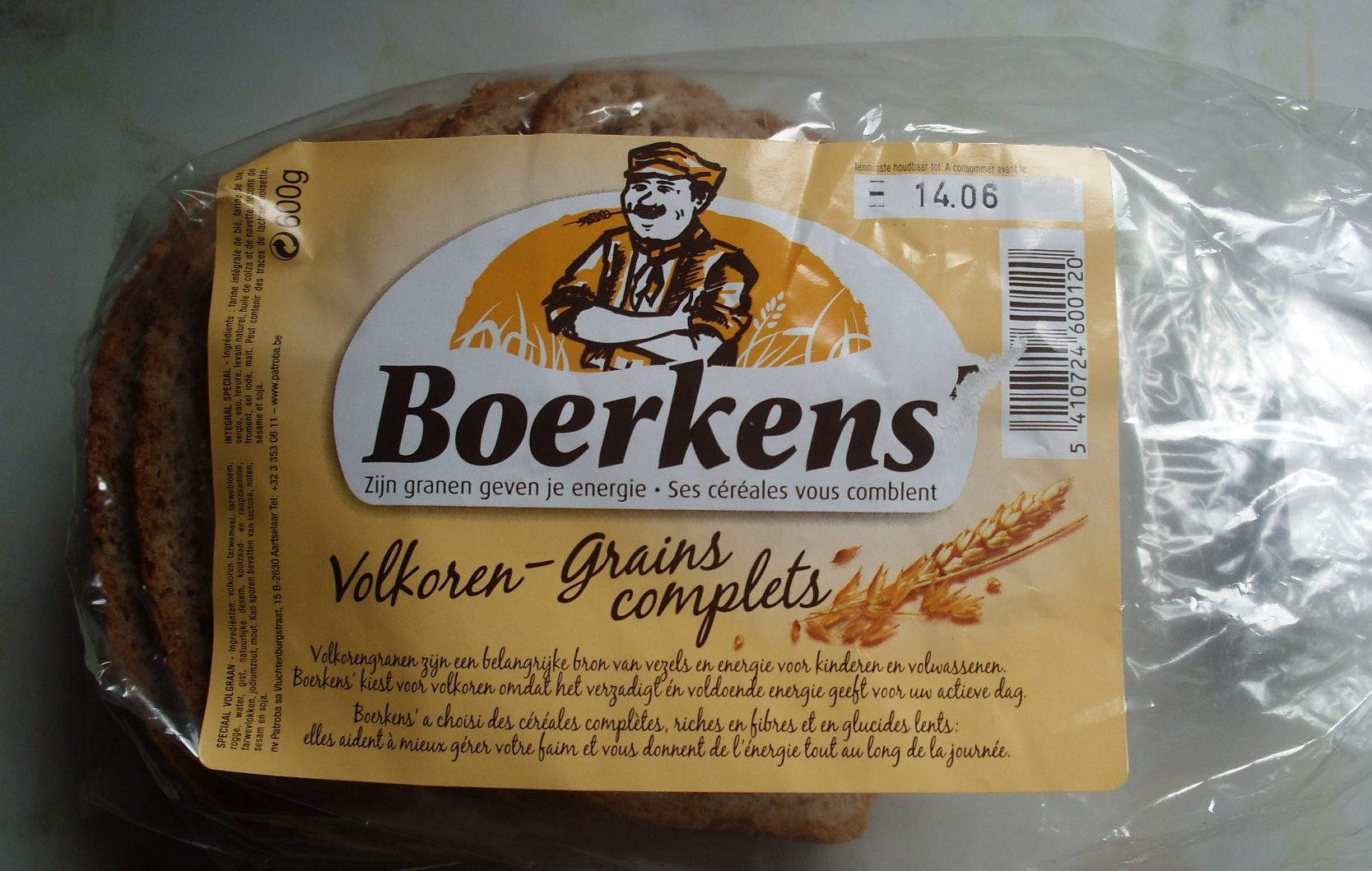 Brood van Patroba - Aartselaar - provincie Antwerpen - België